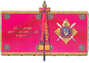 Прапор Управління державної охорони України.